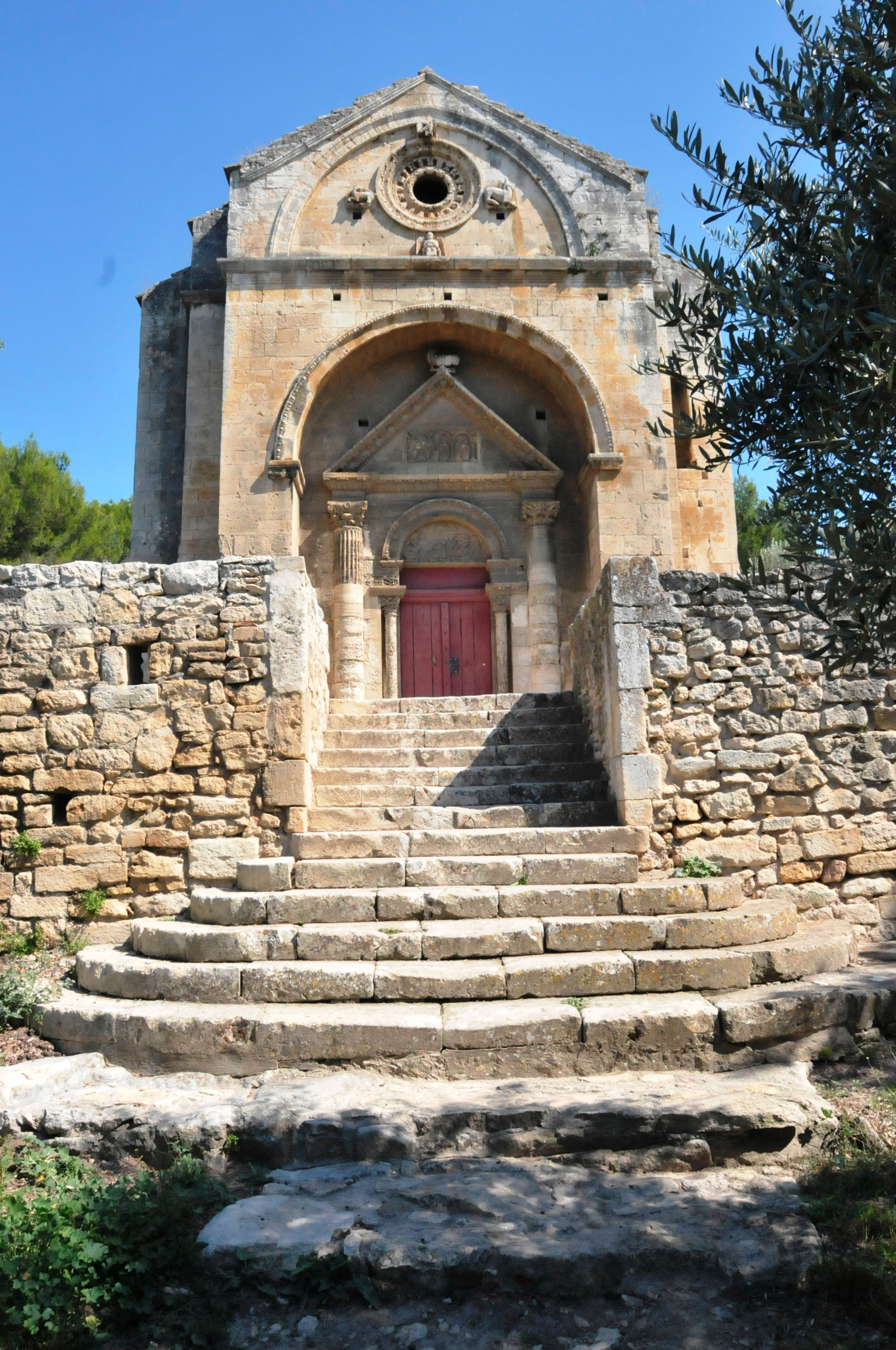 Chapelle Saint Gabriel bei Tarascon